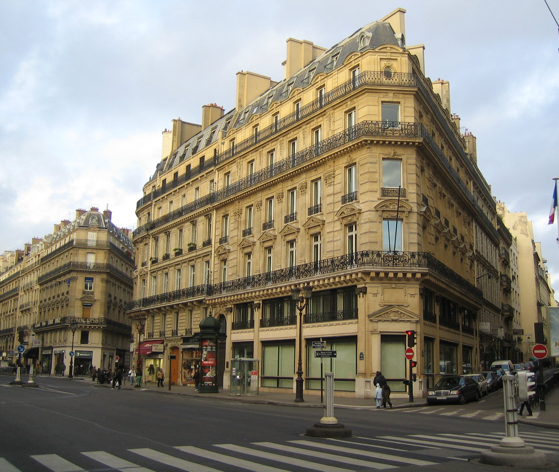 Avenue de l'Opéra, Paris, France.